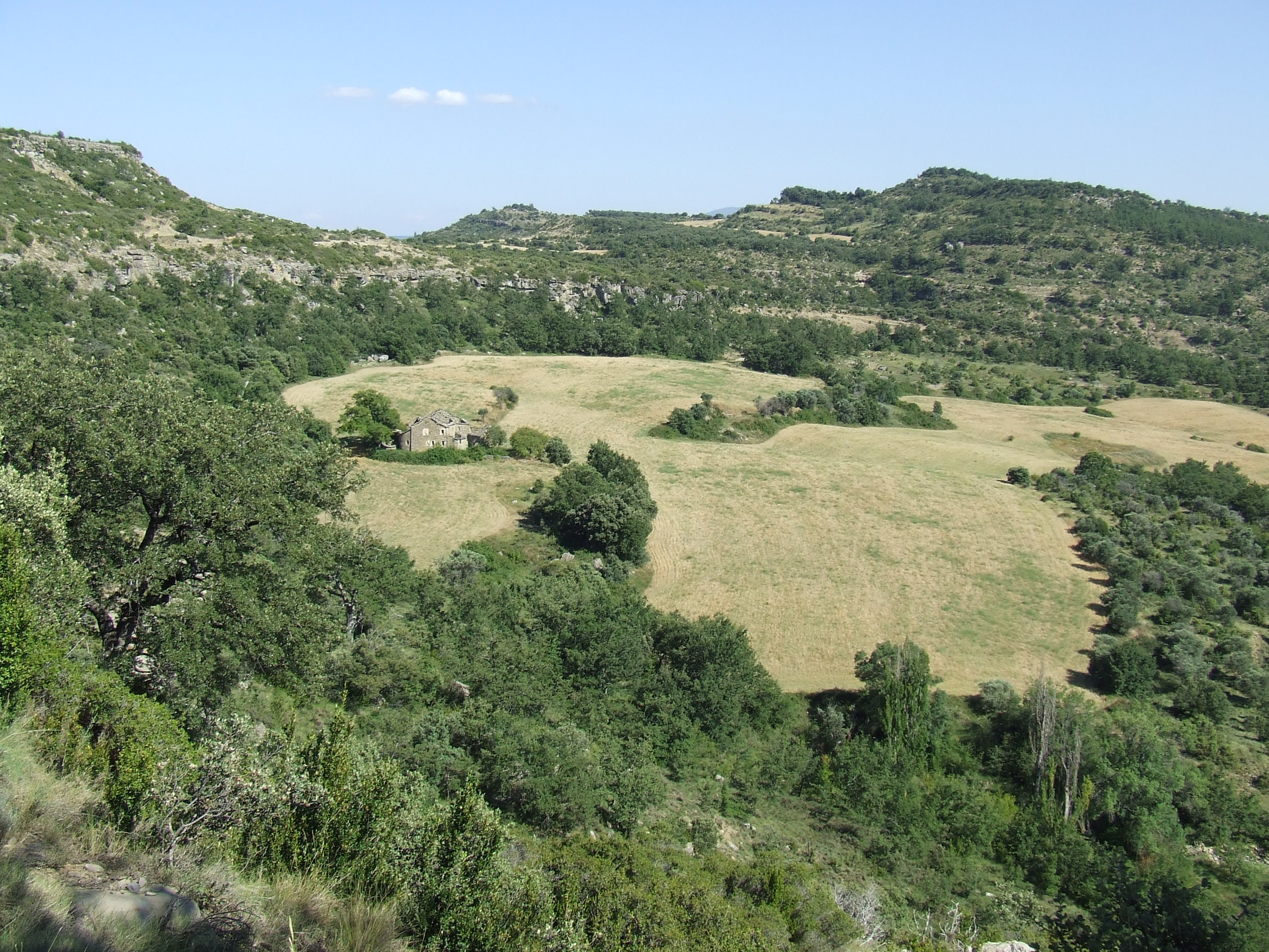 Mas de Condó (el Meüll, Mur, Castell de Mur, Pallars Jussà)